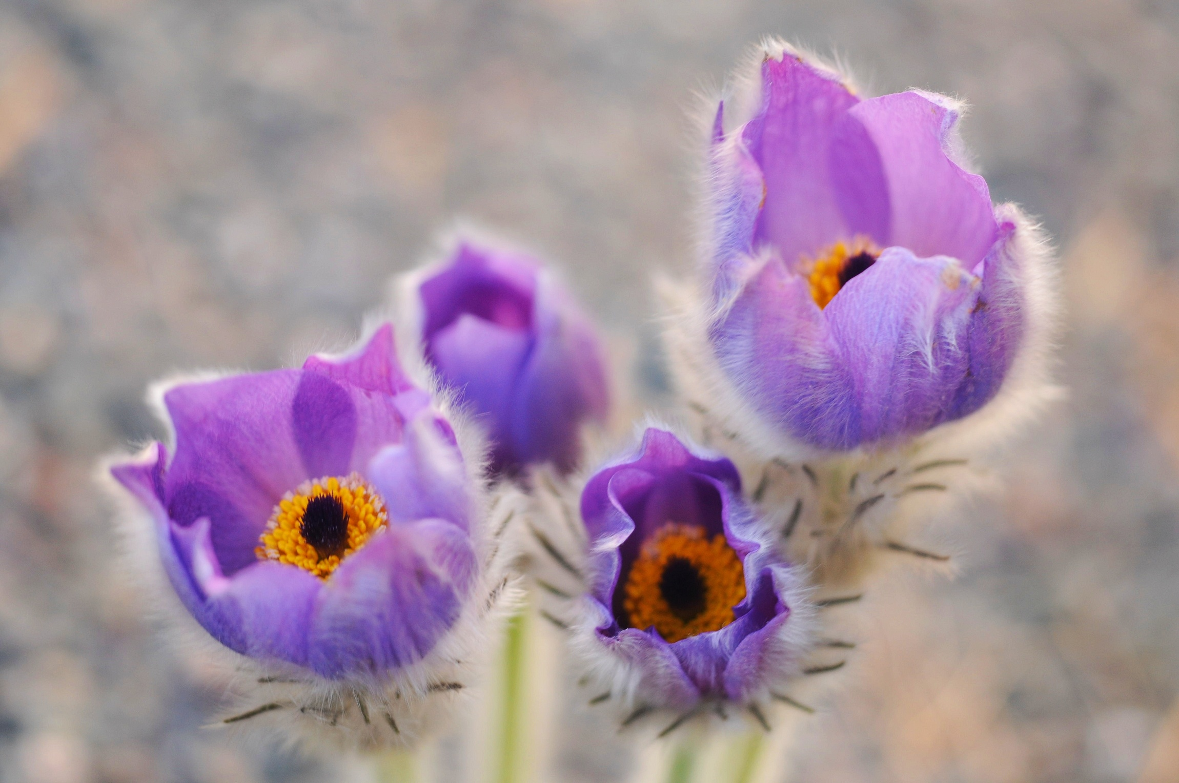 Photograph by Topi Pigula